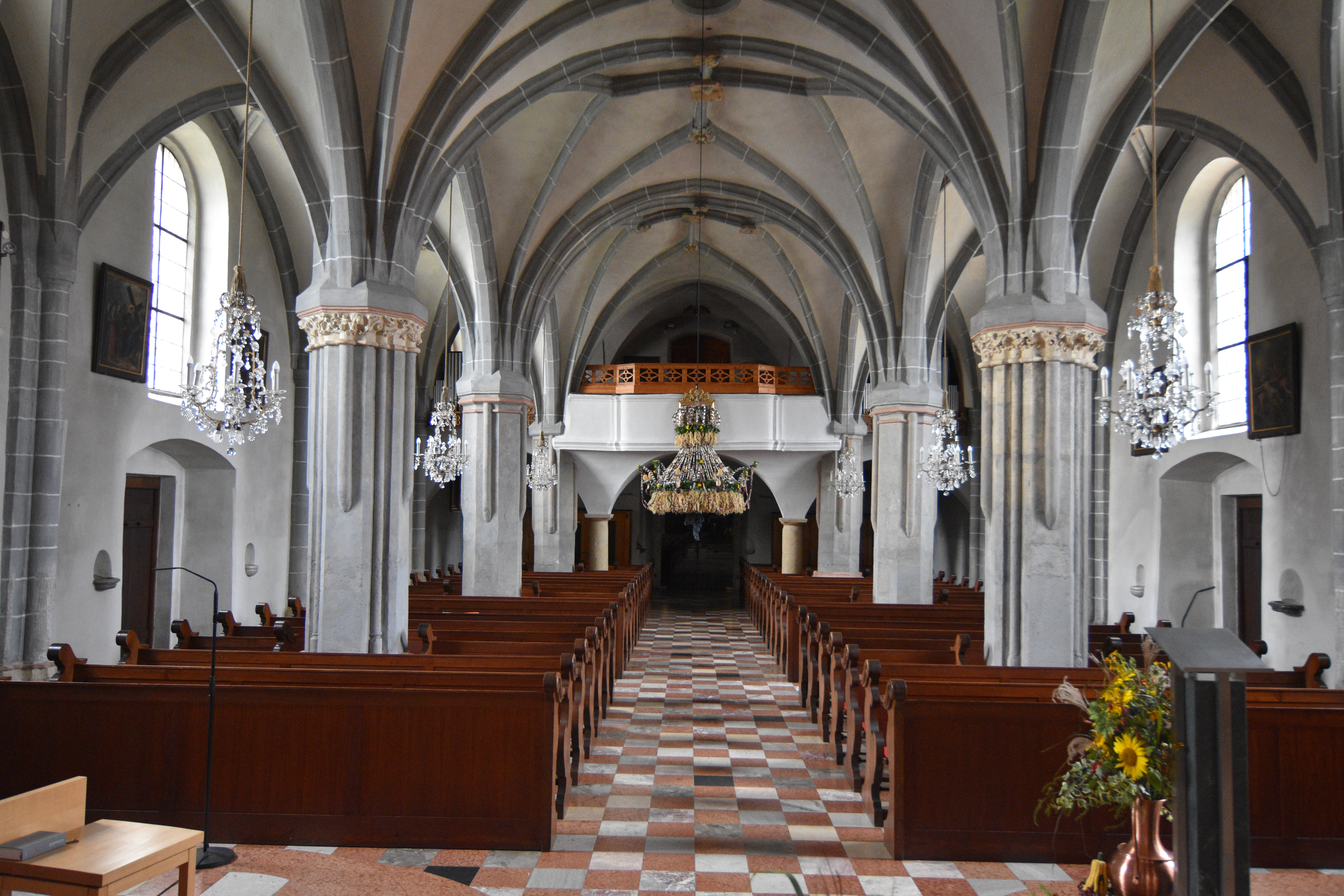 Pfarrkirche Sankt Stefan ob Stainz - Interior